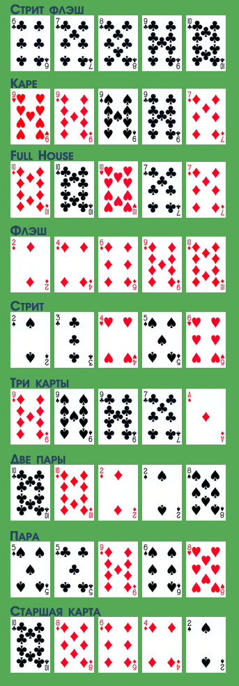 Комбинации в покере